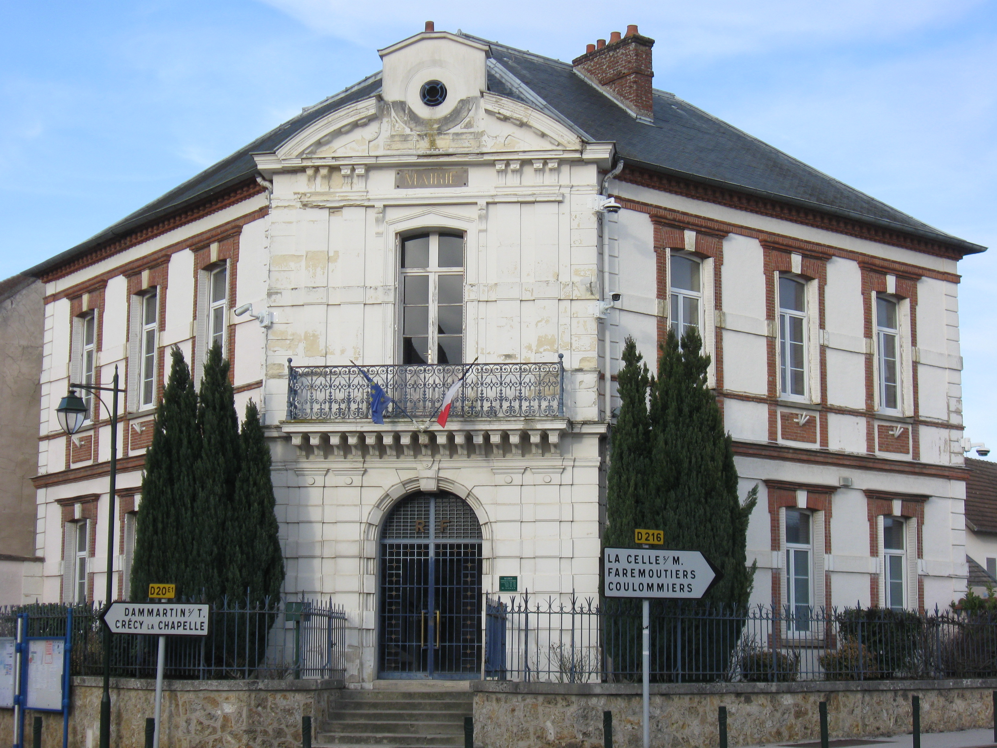 Mairie de Mortcerf. (Seine-et-Marne, région Île-de-France).